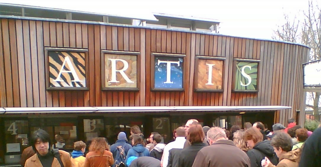 Entrence Artis Zoo, Amsterdam, Netherlands